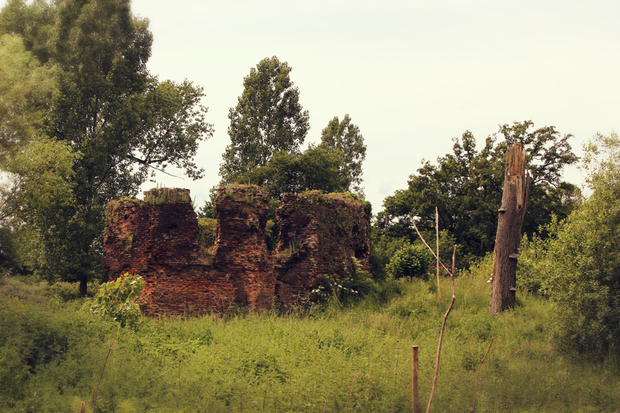 Naborg te Swalmen staat al leeg sinds rond 1450